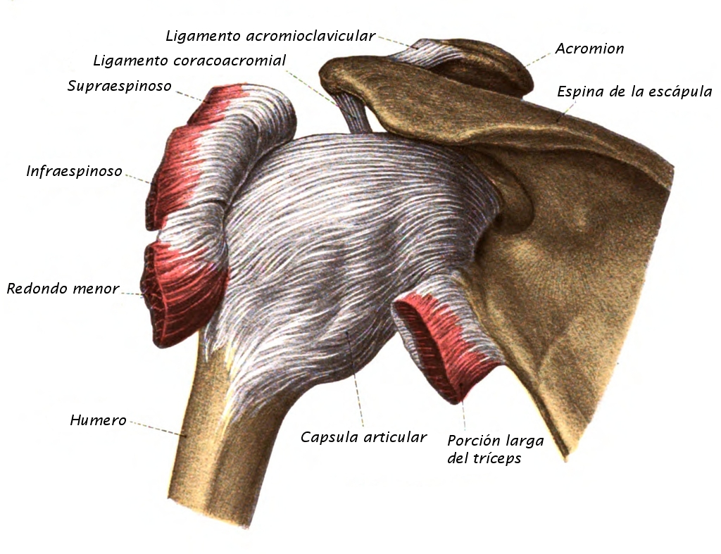 Vista posterior de la región del hombro en la que es visible la cápsula articular de la articulación glenohumeral